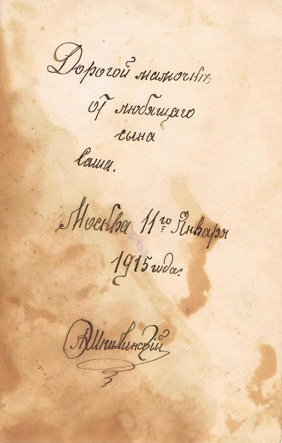 Автограф Олександра Шпилинського